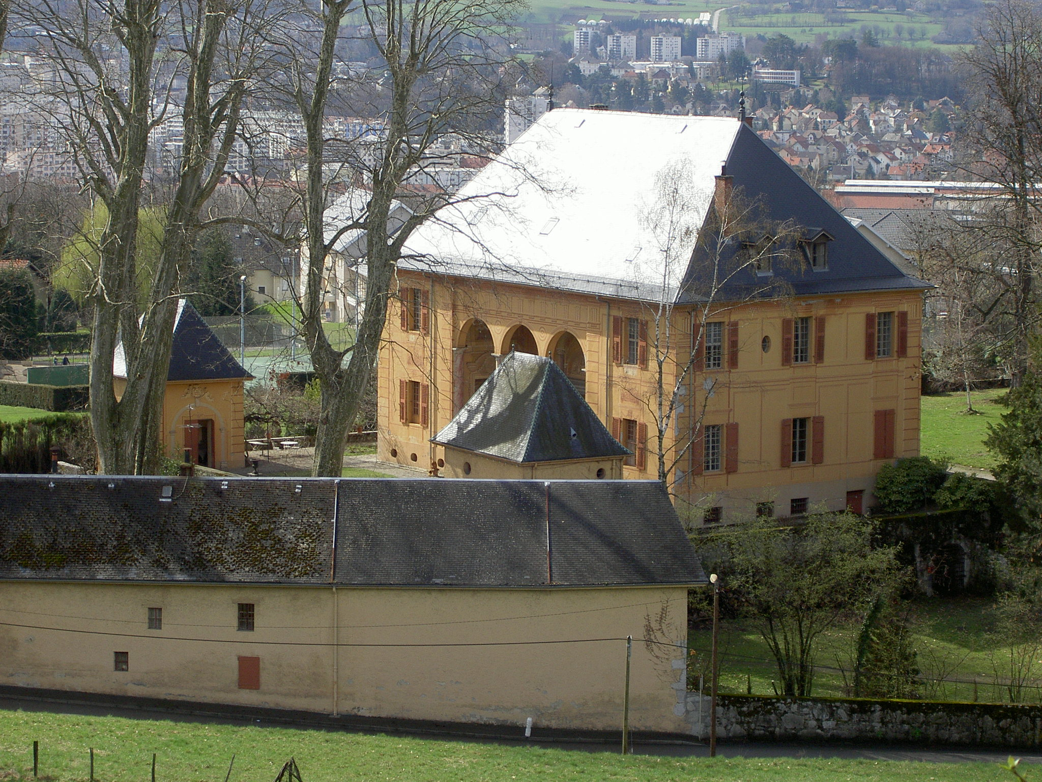 Le château de Caramagne, sur les hauteurs de Chambéry.